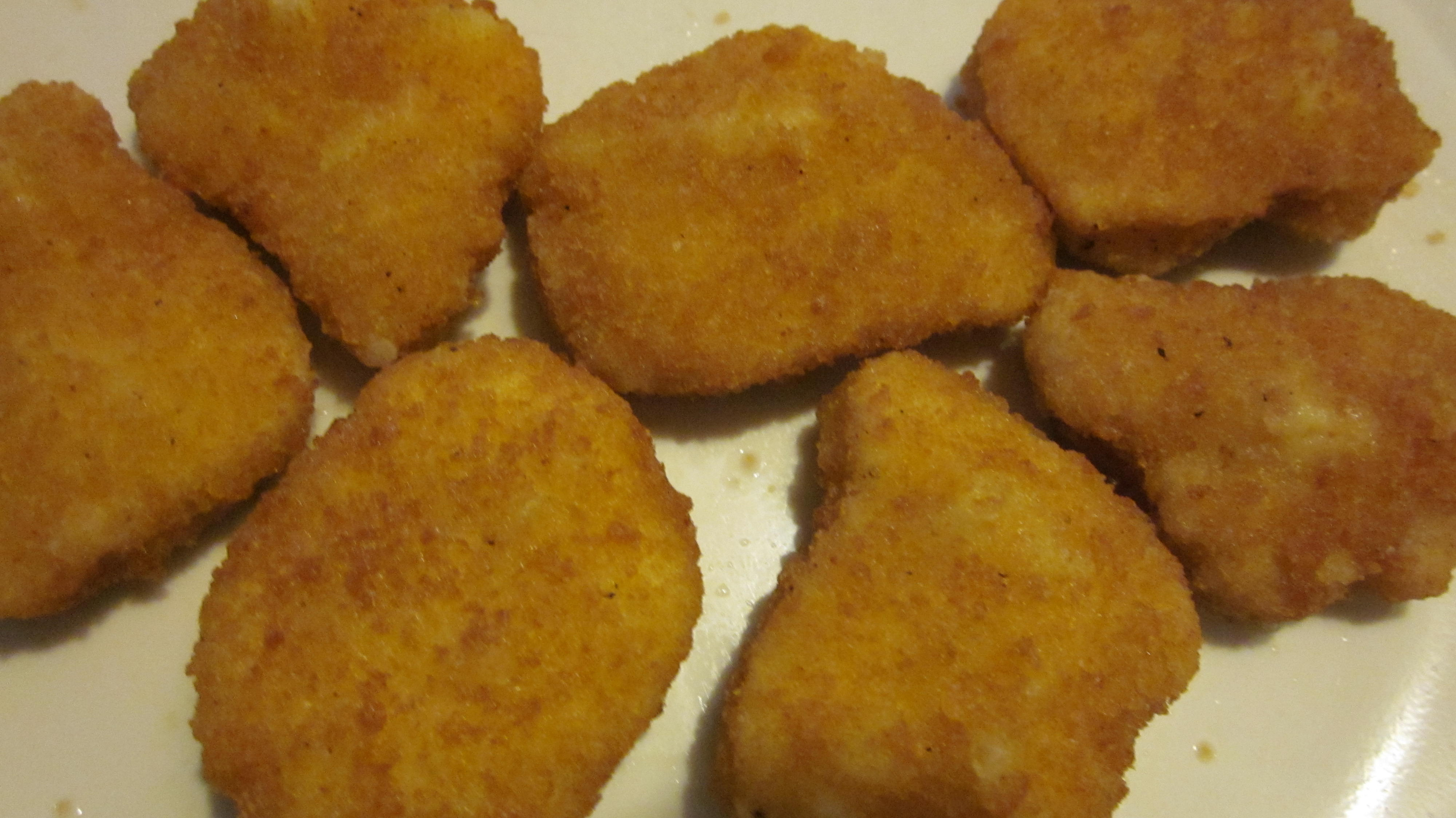 Cooked Foster Farms breast nuggets.